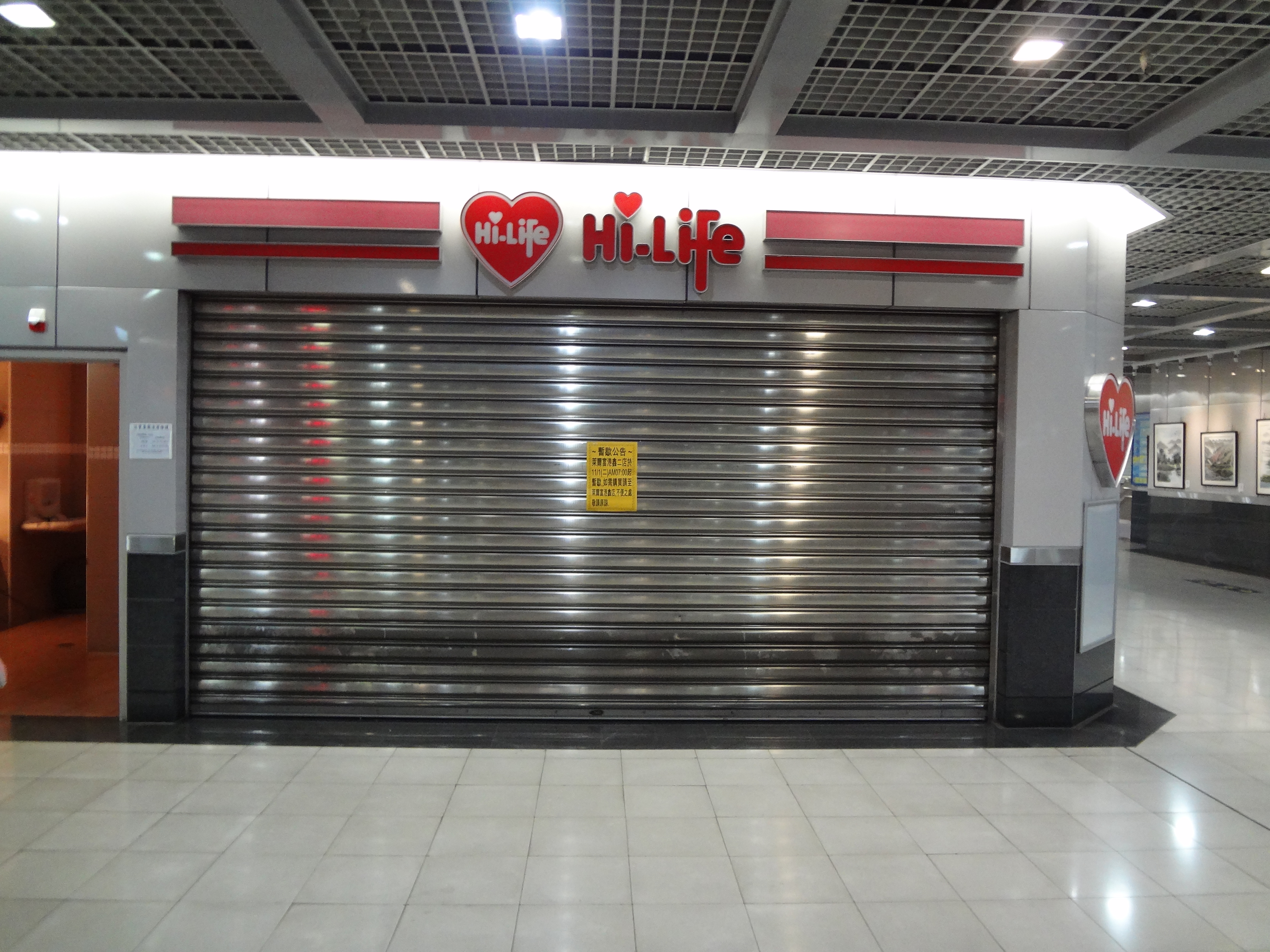 萊爾富北市港鑫二店，位於臺灣鐵路管理局南港車站地下二樓，2016年11月1日起暫停營業。